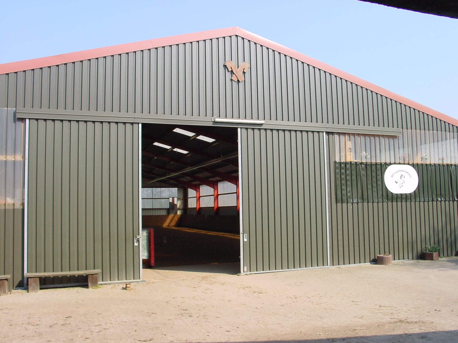 Riding hall (outside) in Altenhorst (Langenhagen)